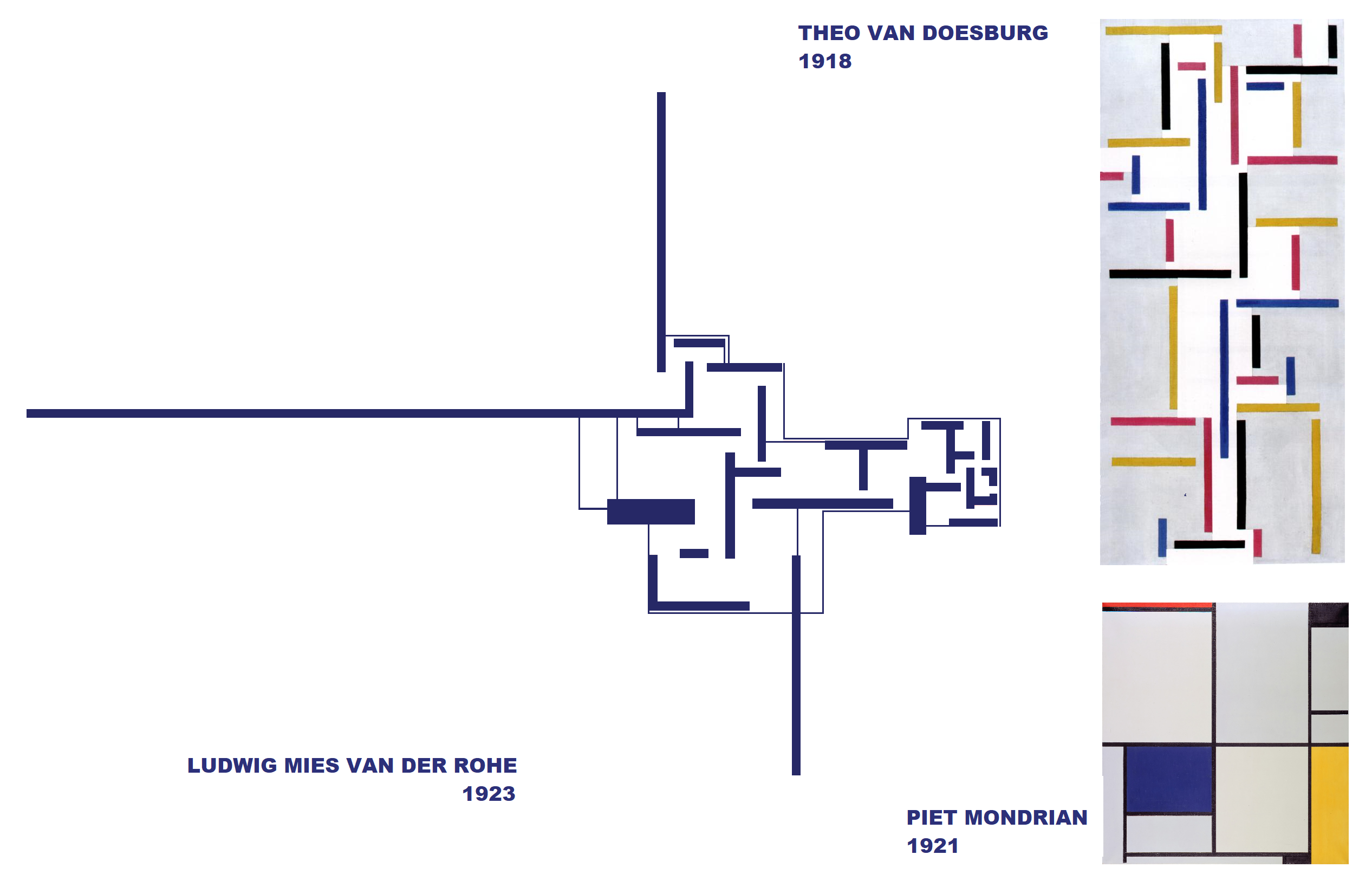 Mies van der Rohe, plan de la maison de campagne en briques, 1923, tableaux de Mondian et de Van Doesburg